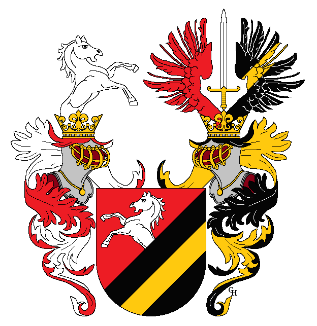 Wappen des k.u.k. Feldmarschalleutnants Otto Josef Berndt (1865–1957), verliehen anlässlich seiner Erhebung in den österreichischen Ritterstand 1917. Zeichnung von Gerd Hruška ( Für weitere Informationen zu dieser Standeserhebung siehe (